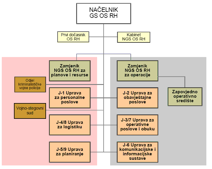 Ustrojstvo Glavnog stožera Oružanih snaga Republike Hrvatske